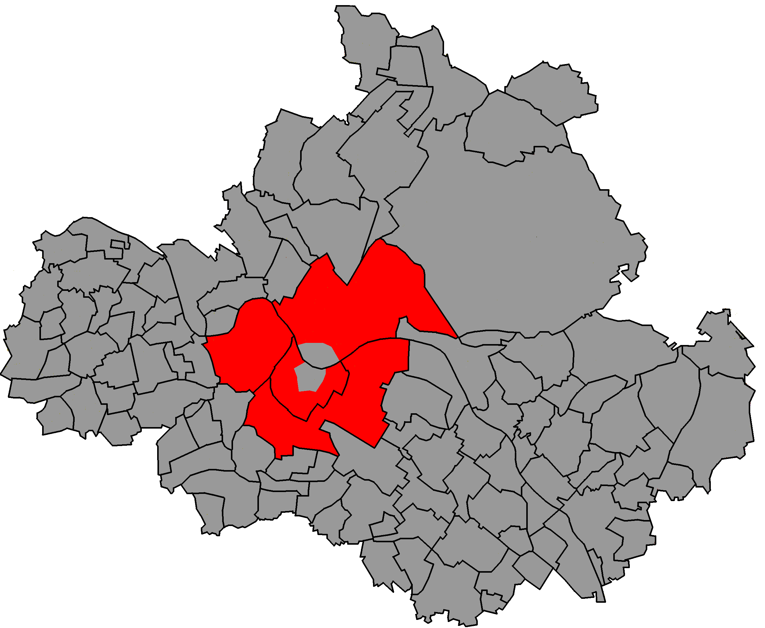 Lage der Dresdner Vorstädte, die die Innere Alt- und Neustadt umschließen, innerhalb Dresdens